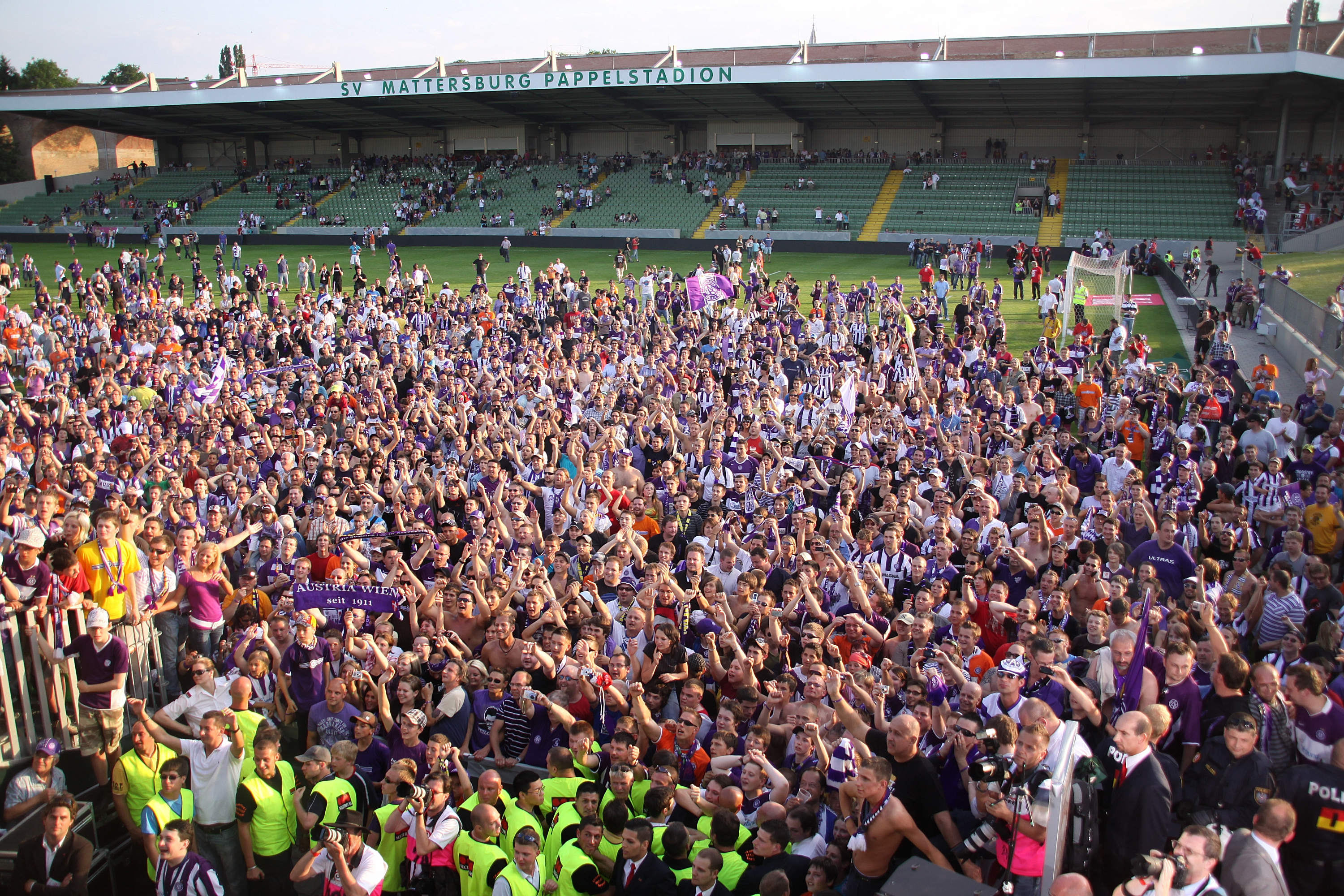 Finale im Österreichischer Fußball-Cup 2008/09 - FC Admira Wacker Mödling gegen FK Austria Wien: Jubelnde Fans der Wiener Austria